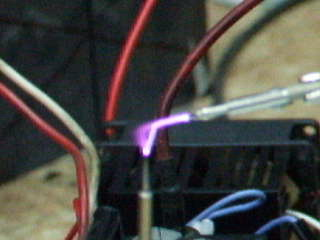 Искровой разряд через сформированный стриммерный канал